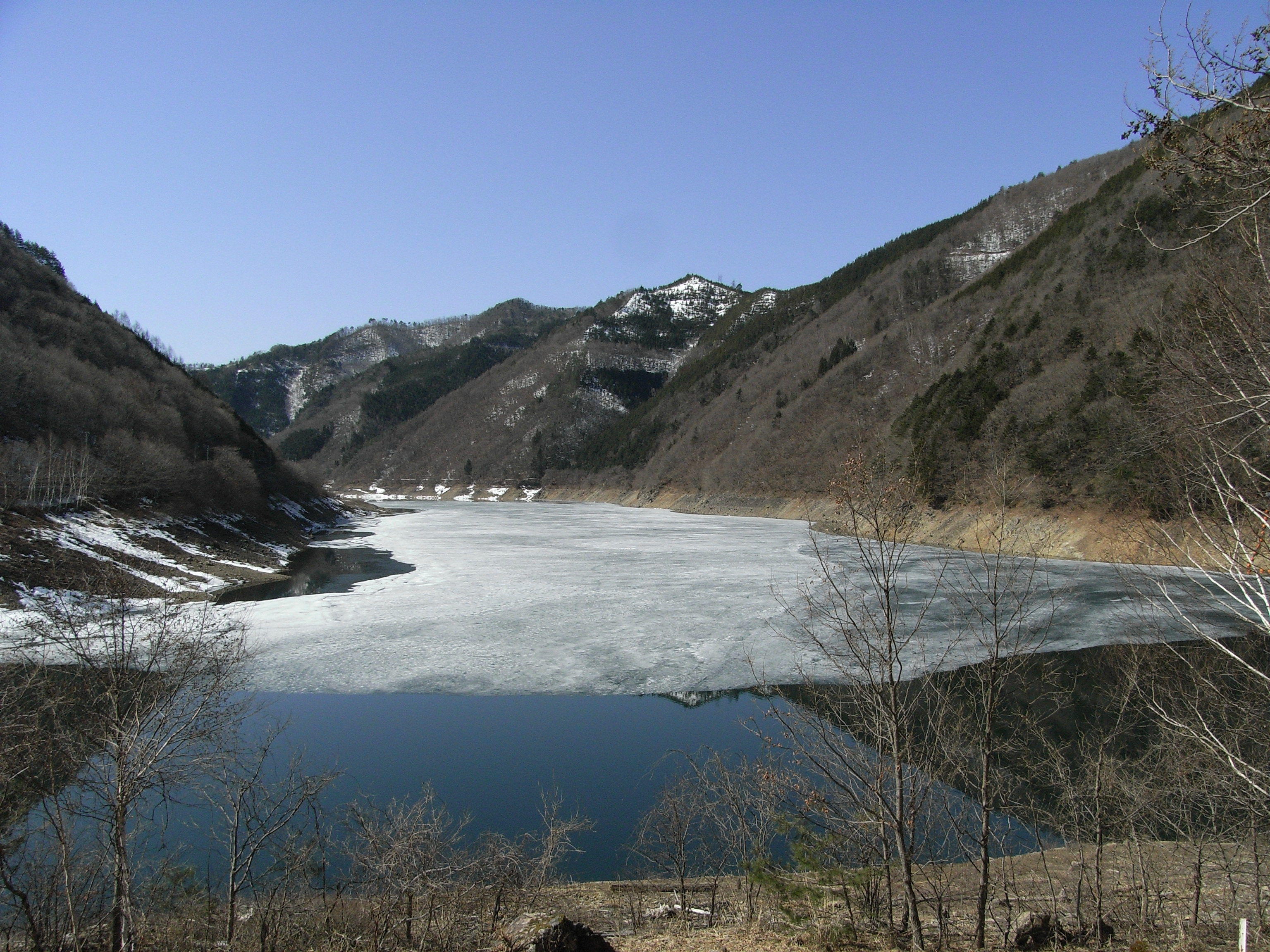 Lake